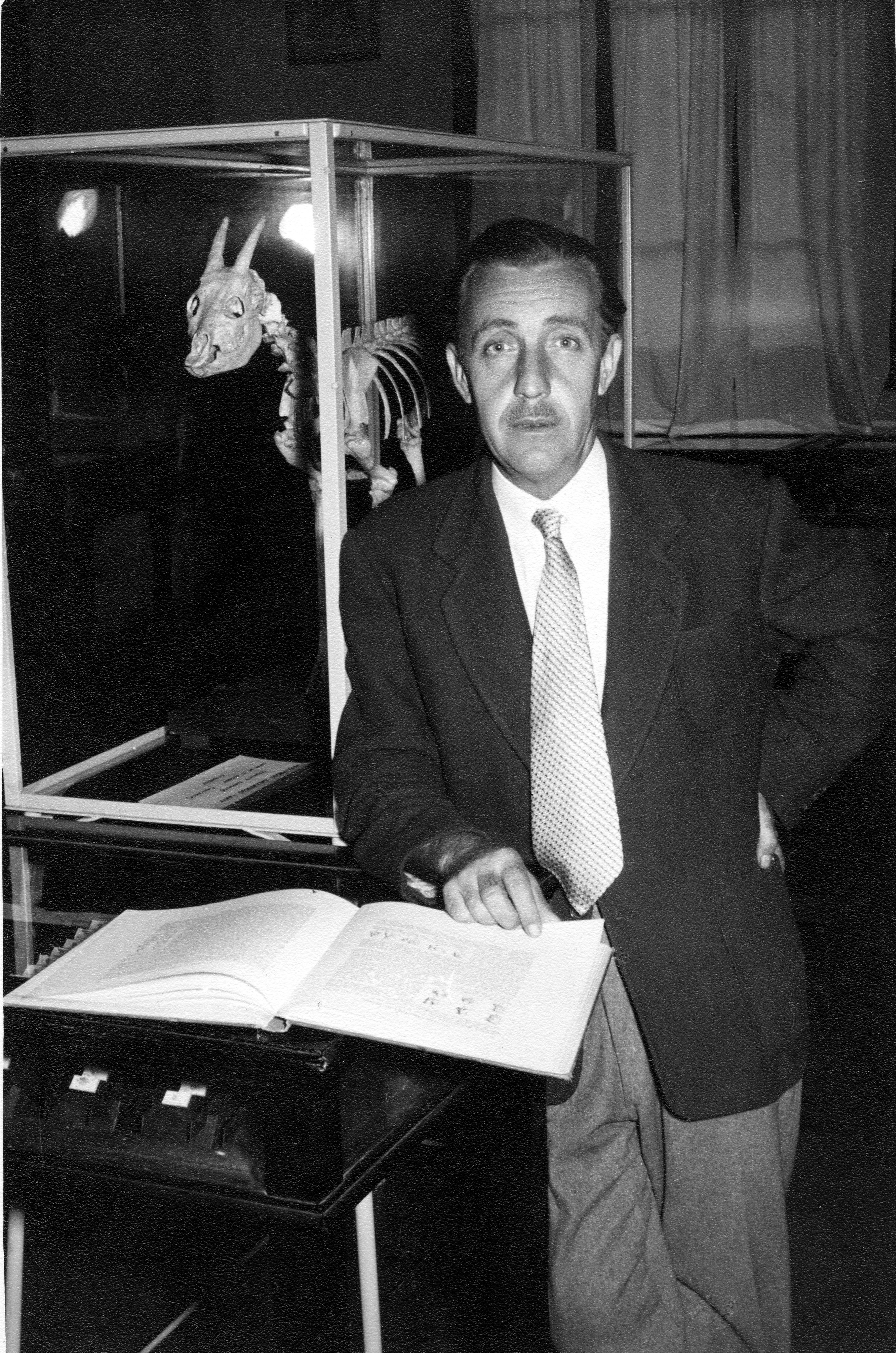 Fotografia de Miquel Crusafont i Pairó